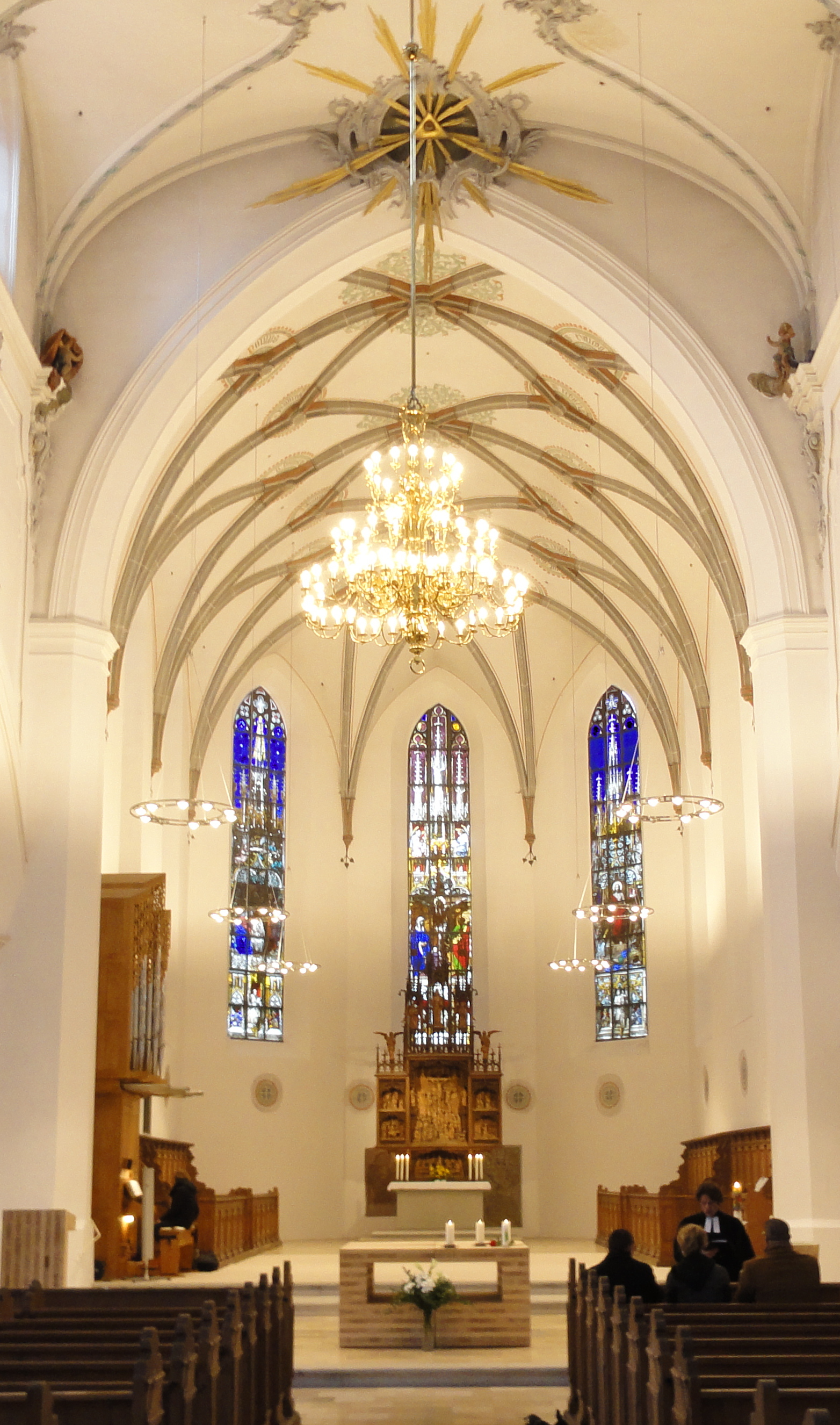 St. Mang-Kirche - Chor